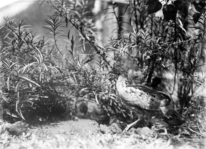 Repronegatief. Mannetje van de Langsnavelpatrijs (Rhizothera longirostris)